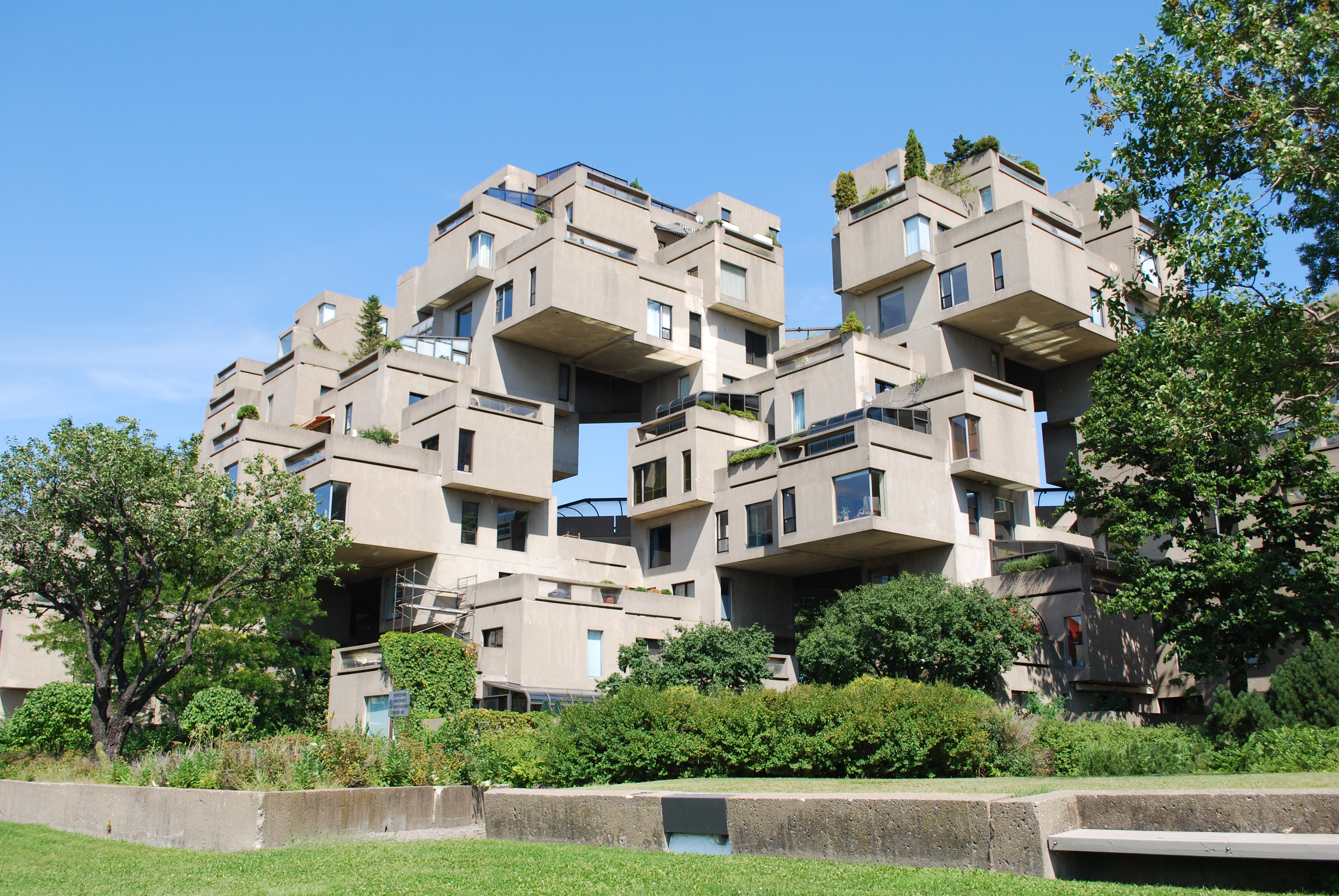 Habitat 67 de Moshe Safdie, Montréal.